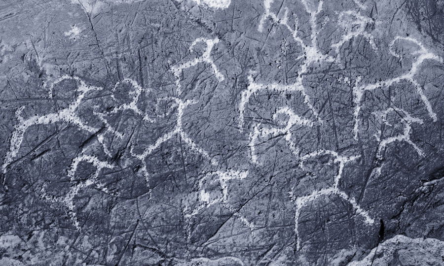 Петроглифы